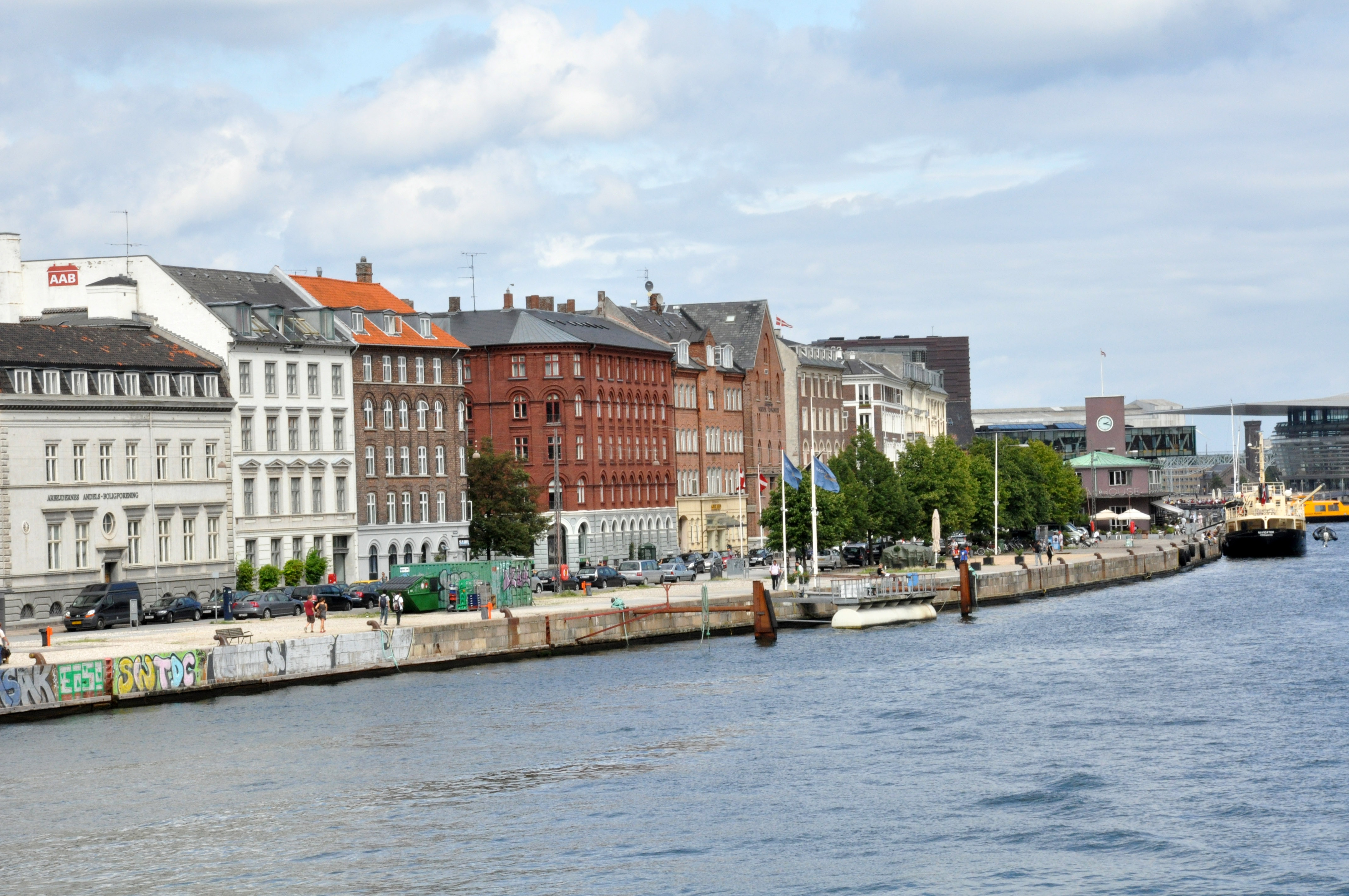 Havnegade in Copenhagen, Denmark